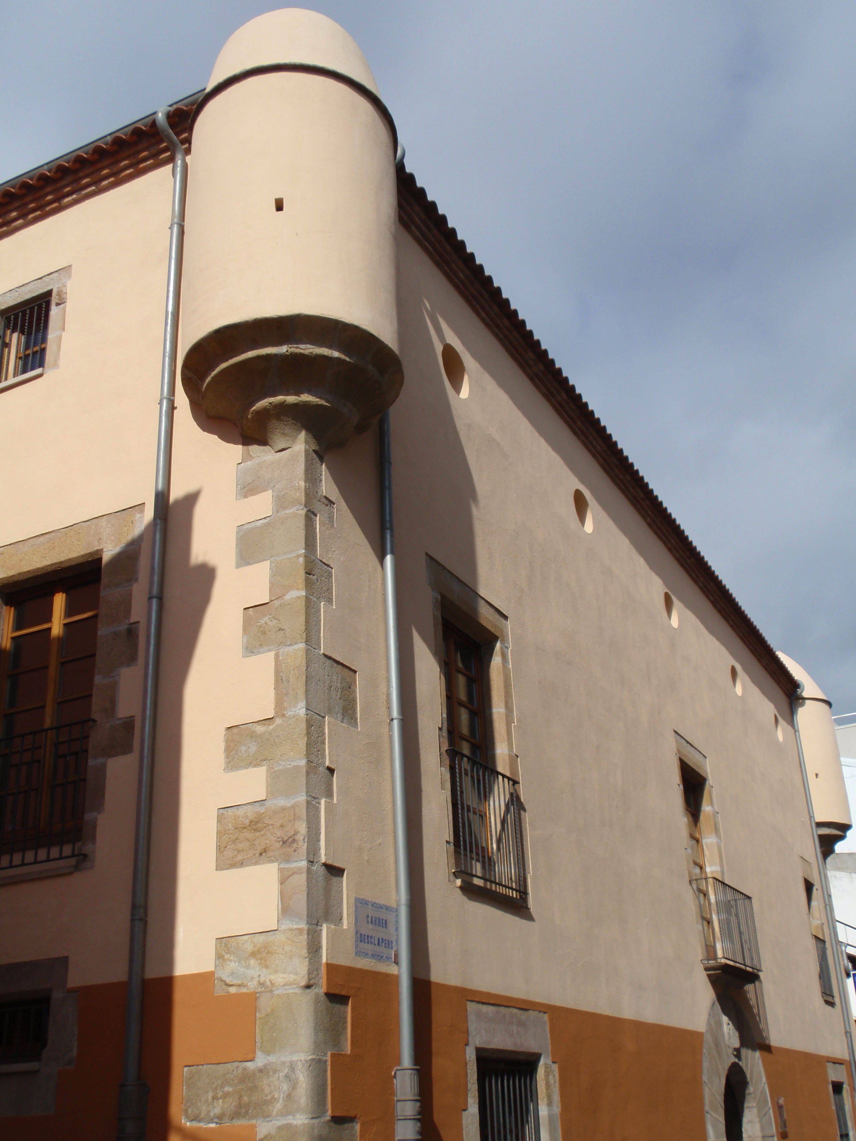 Can Desclapers (Biblioteca La Cooperativa). Malgrat de Mar (Maresme)